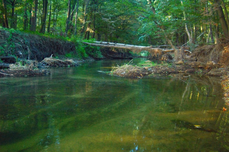 Myjava in CHKO Záhorie